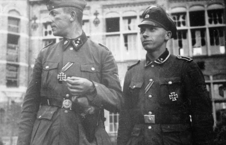 Westfeldzug 1940 EK-Verleihung an Soldaten der Waffen-SS-Totenkopf-Division